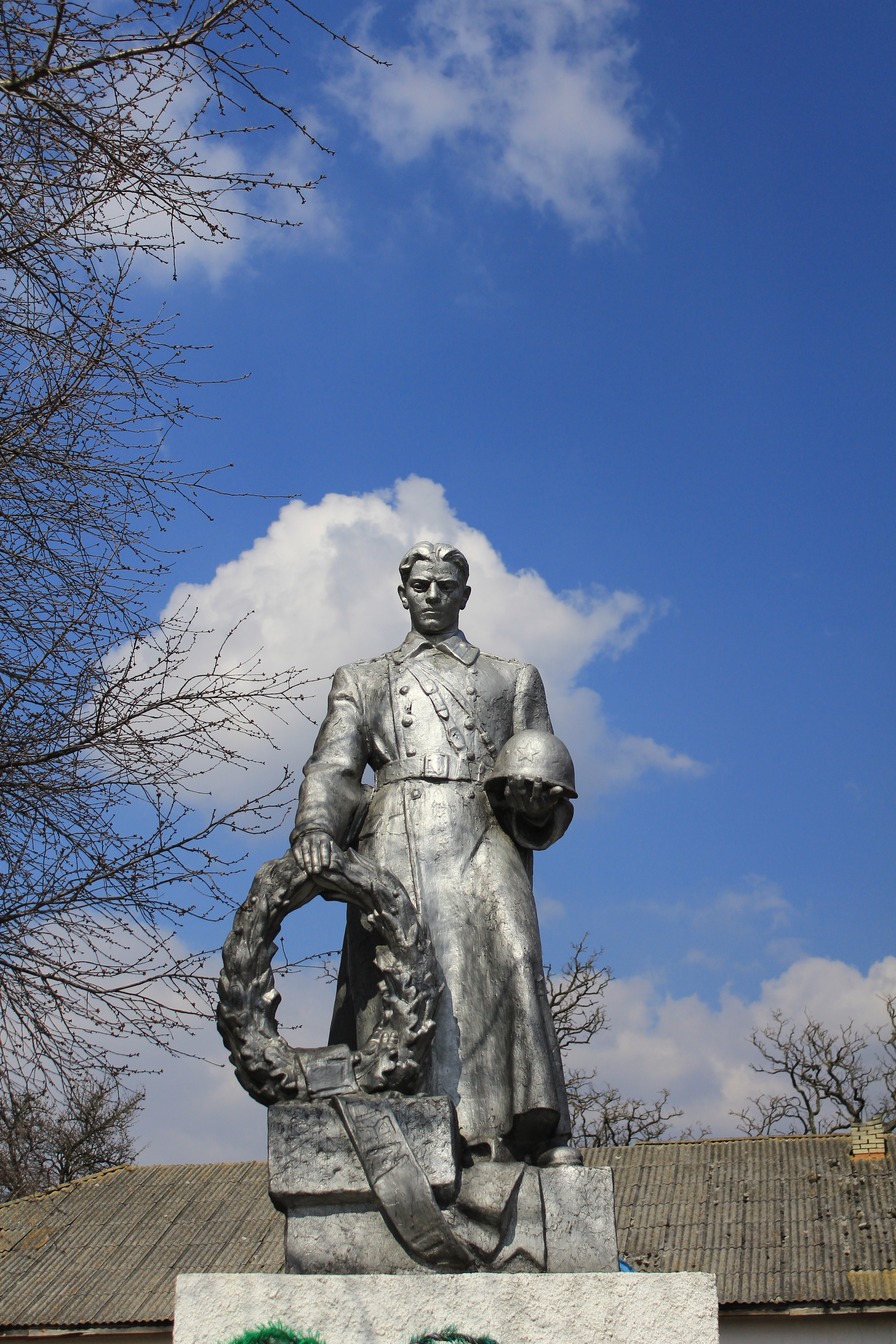 Братська могила радянських воїнів, село Заруддя